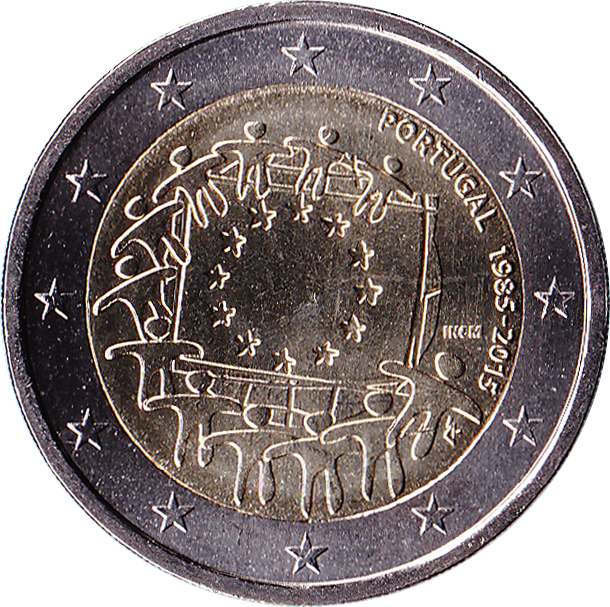 2 Euro Portugal 2015 - 30e anniversaire du drapeau européen